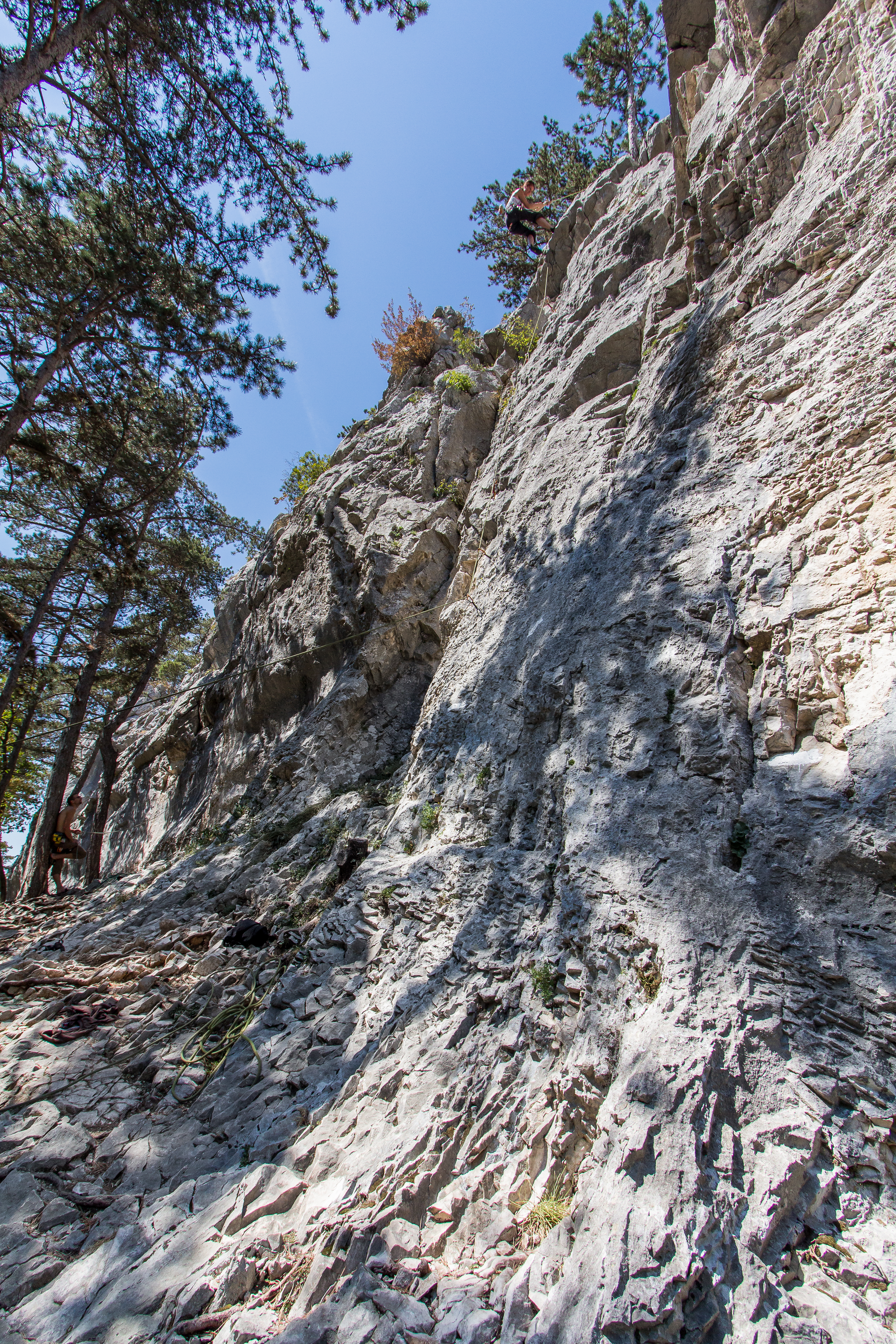 Plezališče Bela